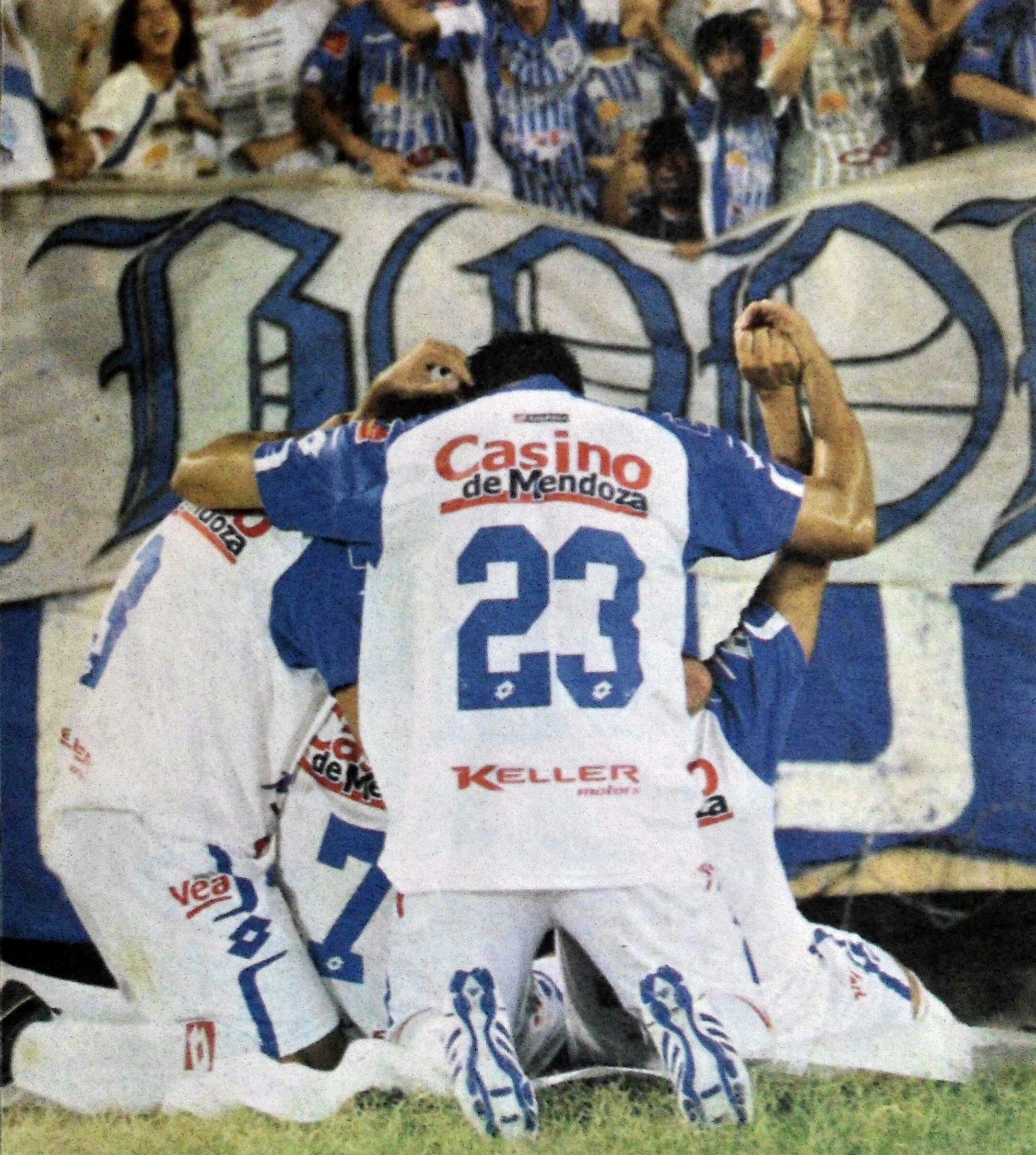 Ariel Rojas celebrando un gol con sus compañeros en Godoy Cruz Antonio Tomba.